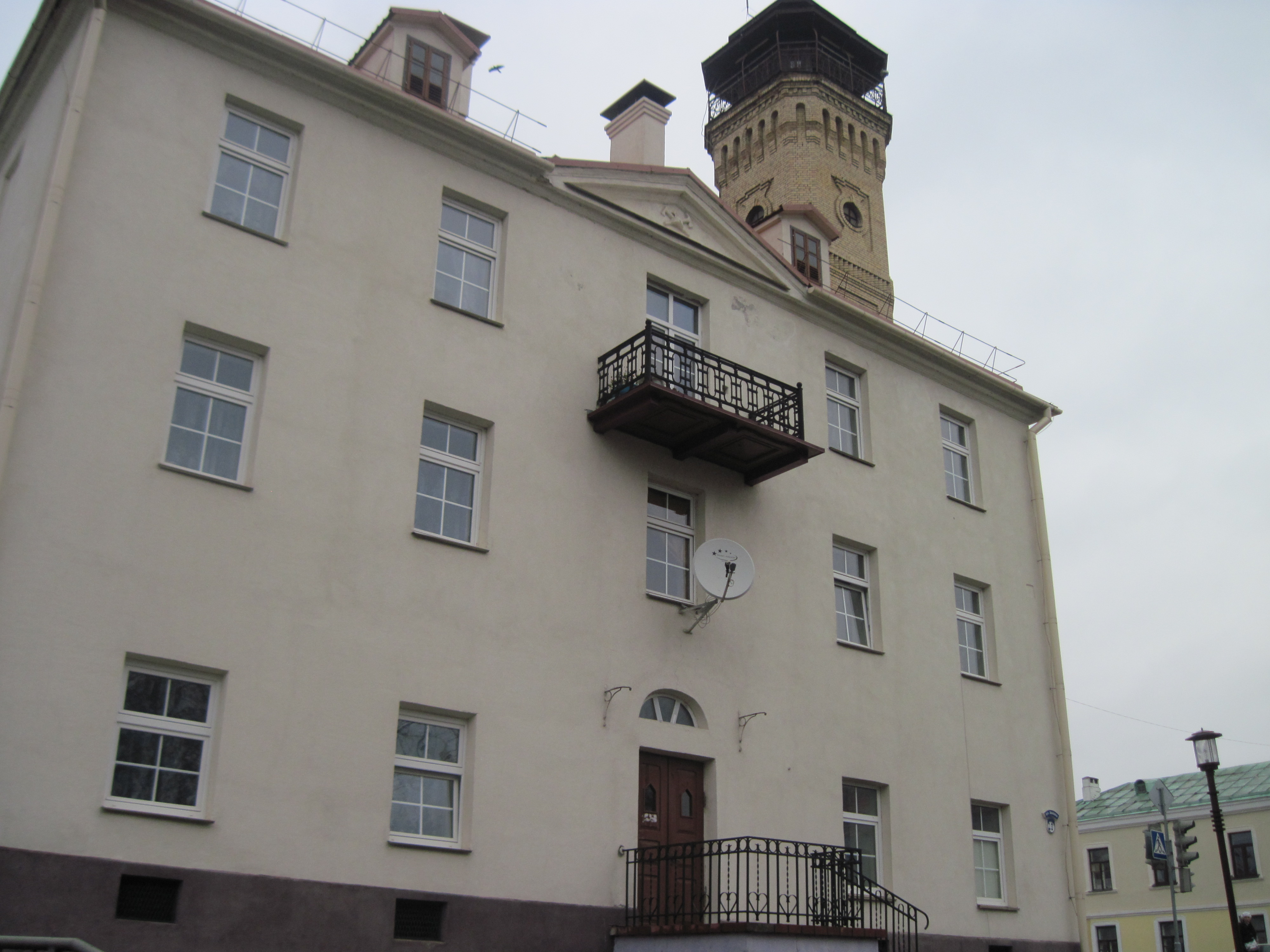 Беларуская (тарашкевіца): Будынак каля каланчы, Замкавай, 19